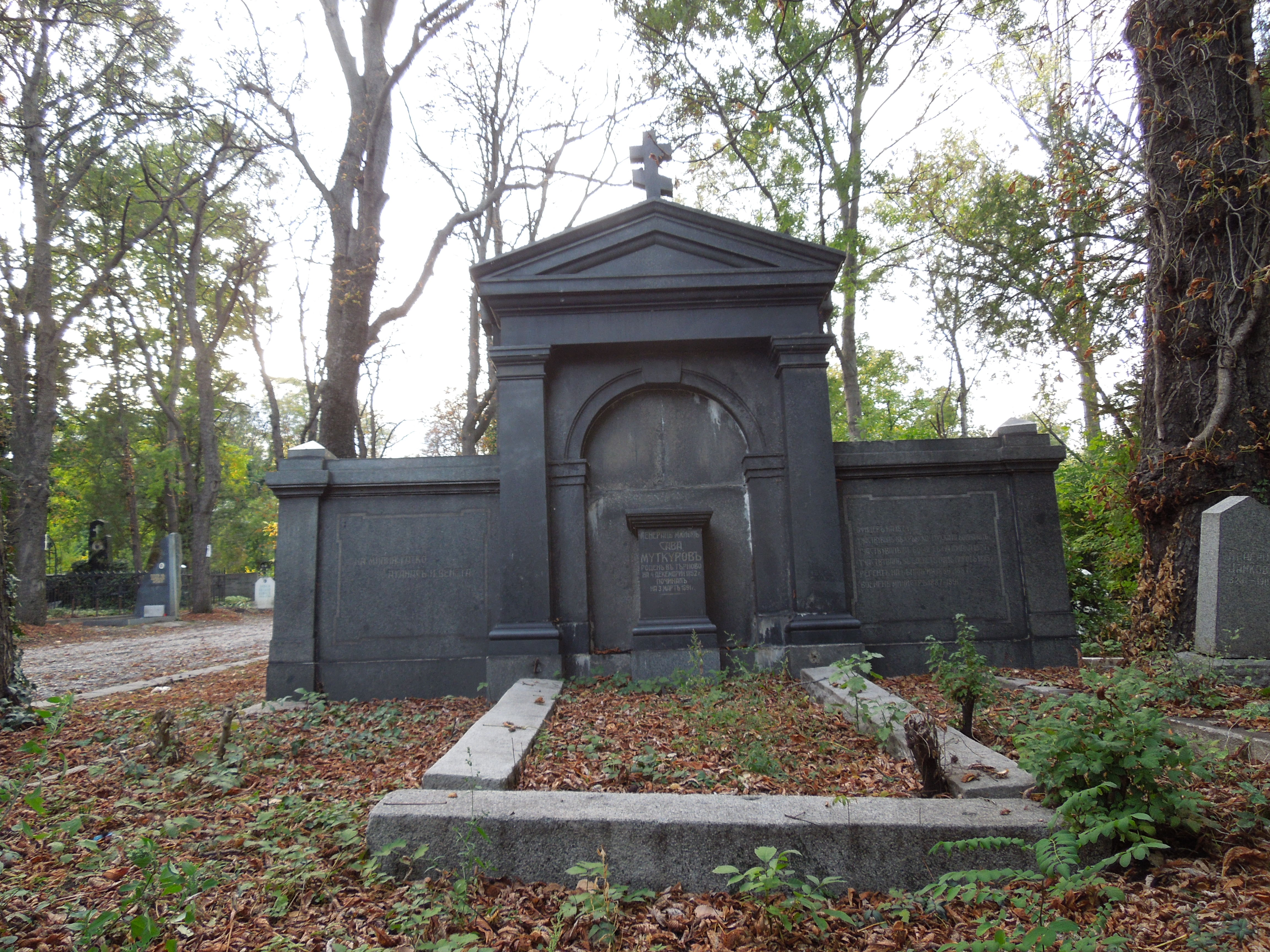 Sofia '17